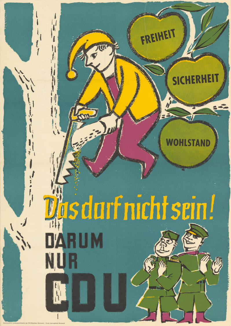 Das darf nicht sein! Darum nur CDU Abbildung: Deutscher Michel sägt am eigenen Ast - Applaudierende Sowjetsoldaten Kommentar: Bedrohung von Freiheit, Sicherheit, Wohlstand Kalter Krieg Plakatart: Motiv-/Textplakat Auftraggeber: Verantw.: Landesgeschäftsstelle der CDU Westfalen, Dortmund Drucker_Druckart_Druckort: Lensingdruck, Dortmund Objekt-Signatur: 10-001: 603 Bestand: Plakate zu Bundestagswahlen (10-001) GliederungBestand10-18: Plakate zu Bundestagswahlen (10-001) » Die 3. Bundestagswahl am 15. September 1957 » Motivplakate Lizenz: KAS/ACDP 10-001: 603 CC-BY-SA 3.0 DE